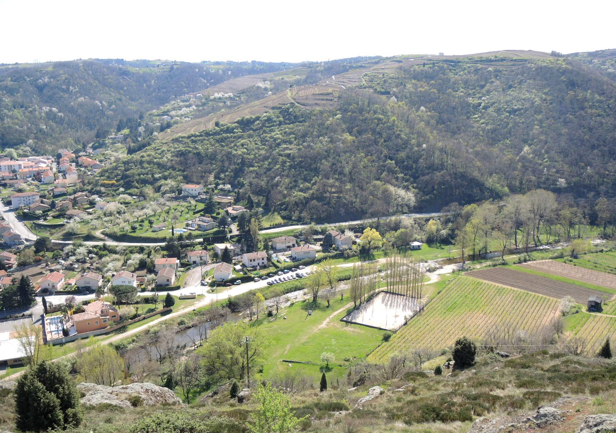 Sarras vue partielle